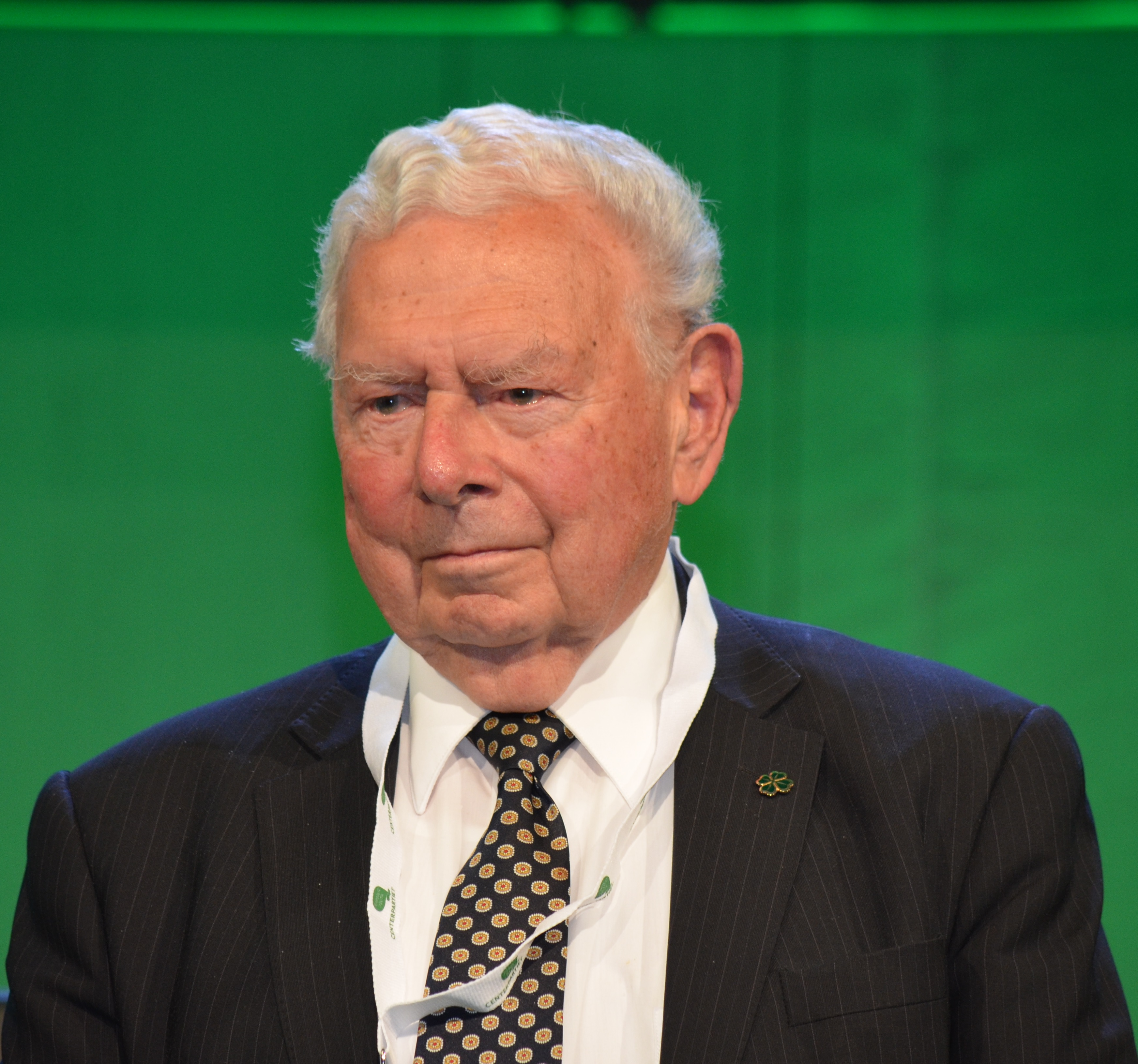 Professorn och f.d. Riksdagsledamoten för Centerpartiet, Lennart Levi.